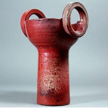 Vase, manufacture Mobach Keramiek, Pays-Bas, XXe siècle (des années '70).